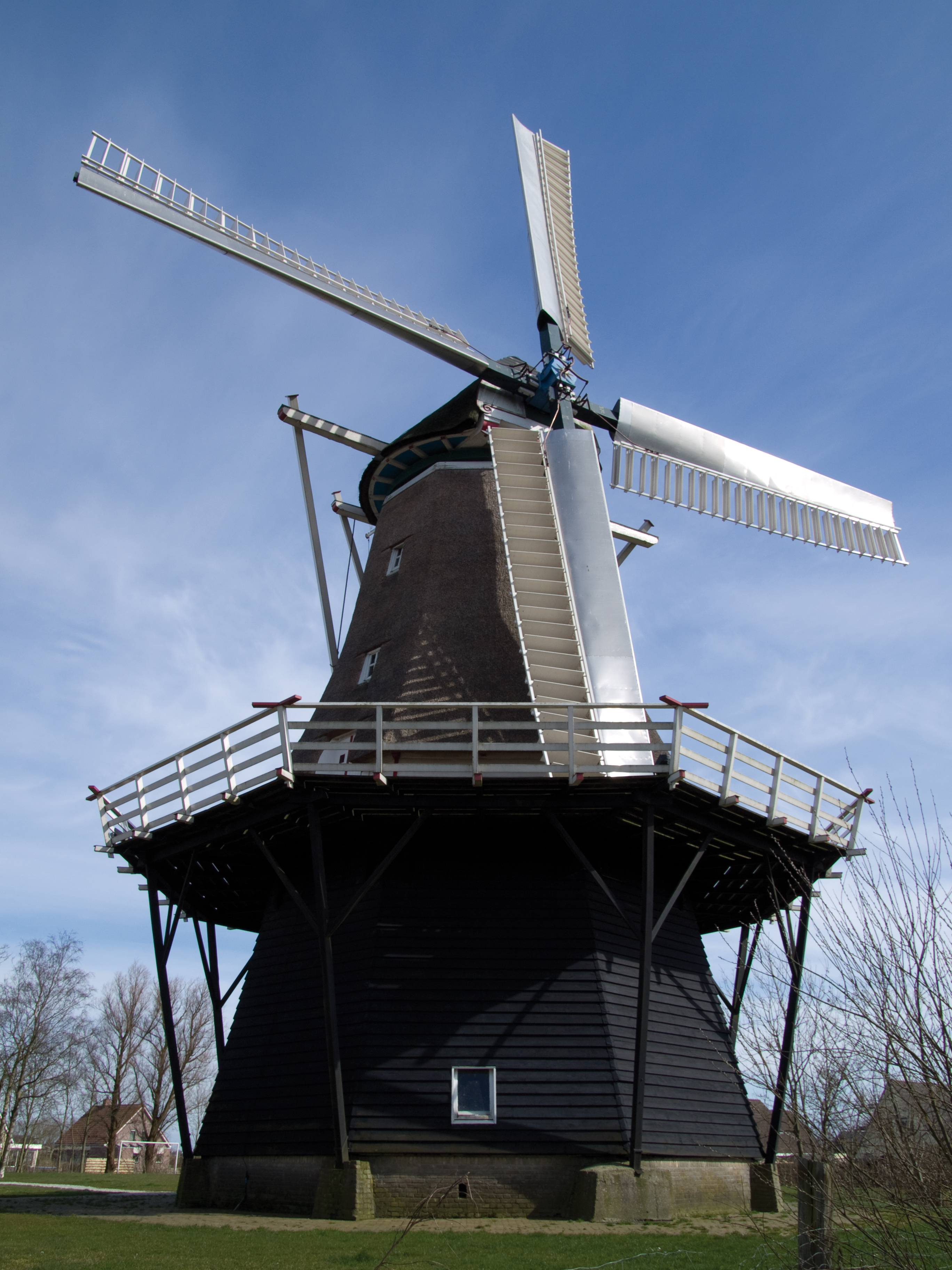 Molen "Windlust" in Burum. De molen brandde volledig af op 8 april 2012